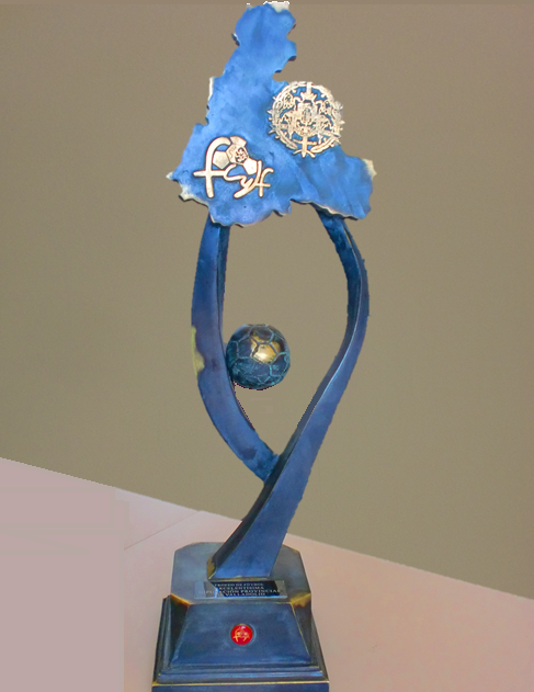 Trofeo Diputación de Valladolid